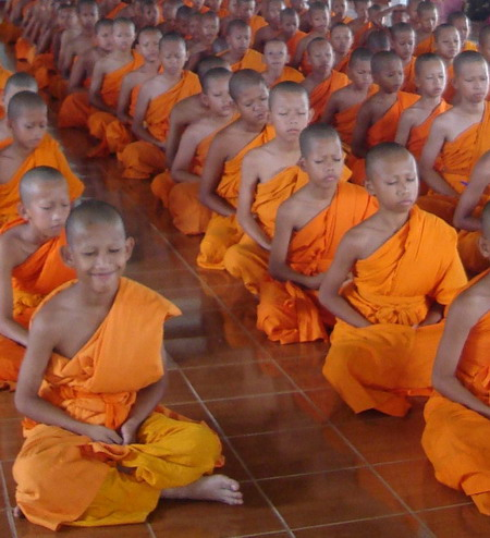 กลุ่มสามเณรผู้บรรพชาในโครงการอบรมปฏิบัติธรรมนักเรียนระดับชั้นมัธยมศึกษาปีที่ ๑ โรงเรียนอุตรดิตถ์วิทยา จังหวัดอุตรดิตถ์ กำลังนั่งสมาธิ Novitiate group in the Buddhism sits the concentration prays, Uttaradit Thailand